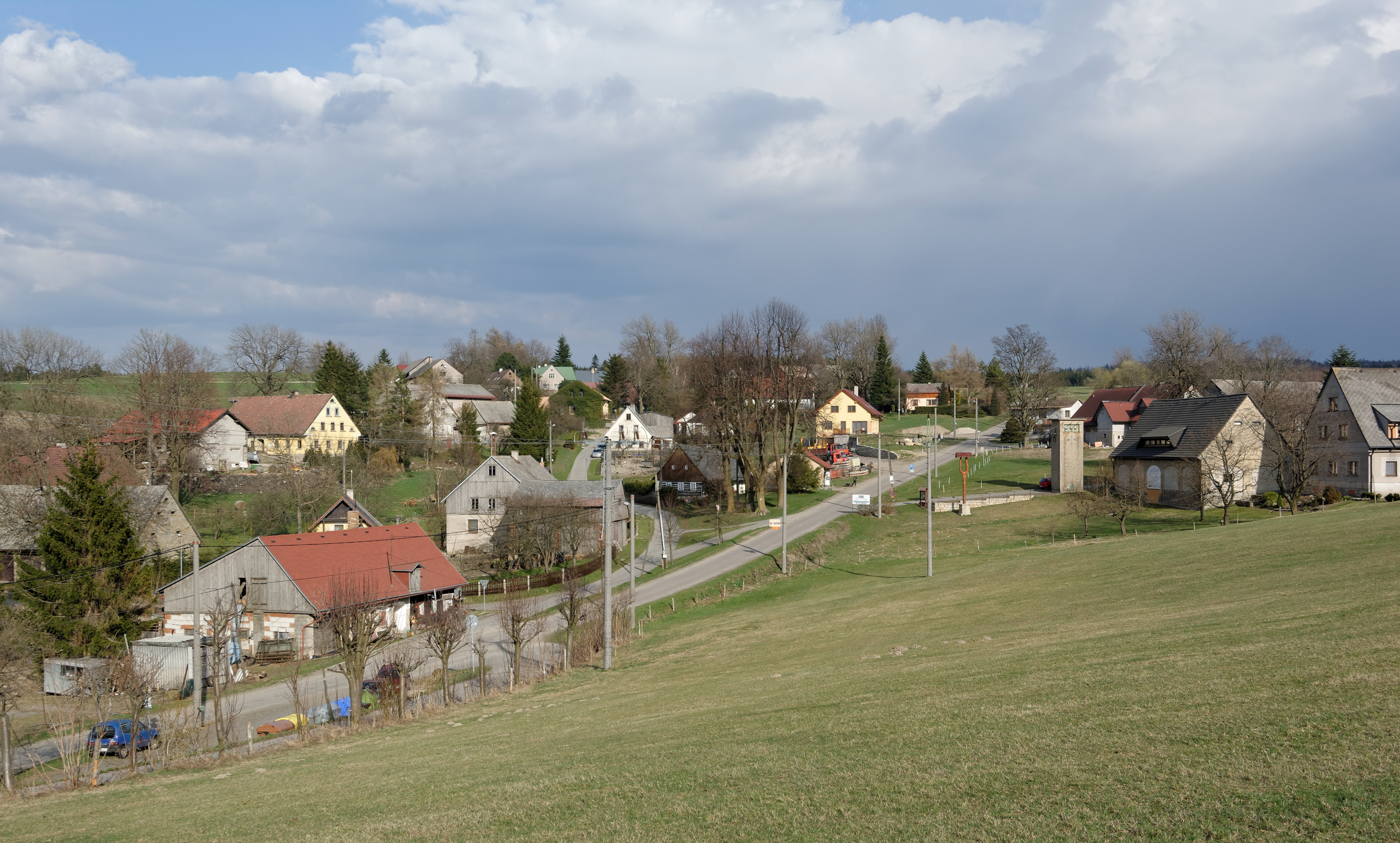 Obec Slavný, pohled od západu.